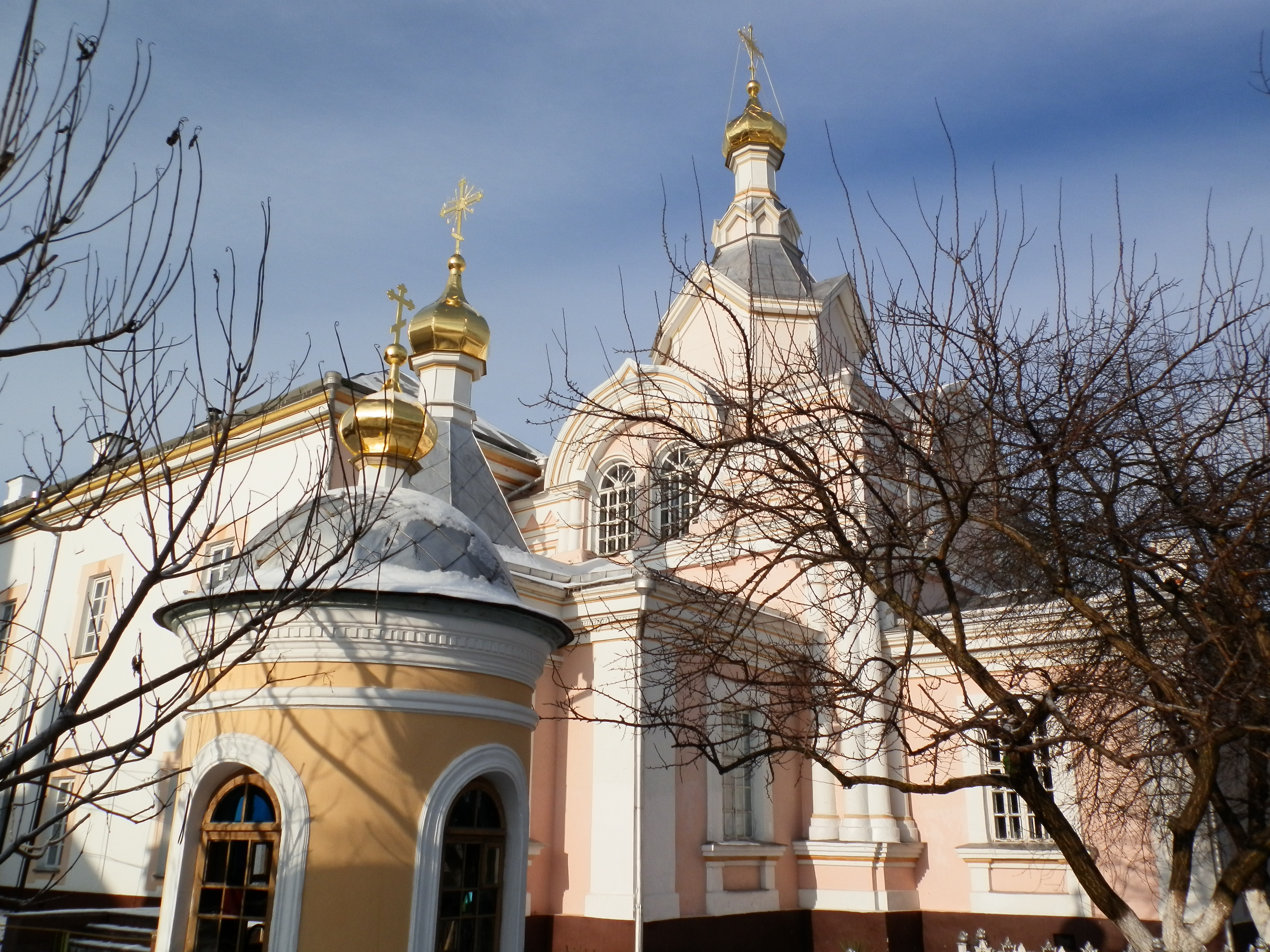 Вид на скит